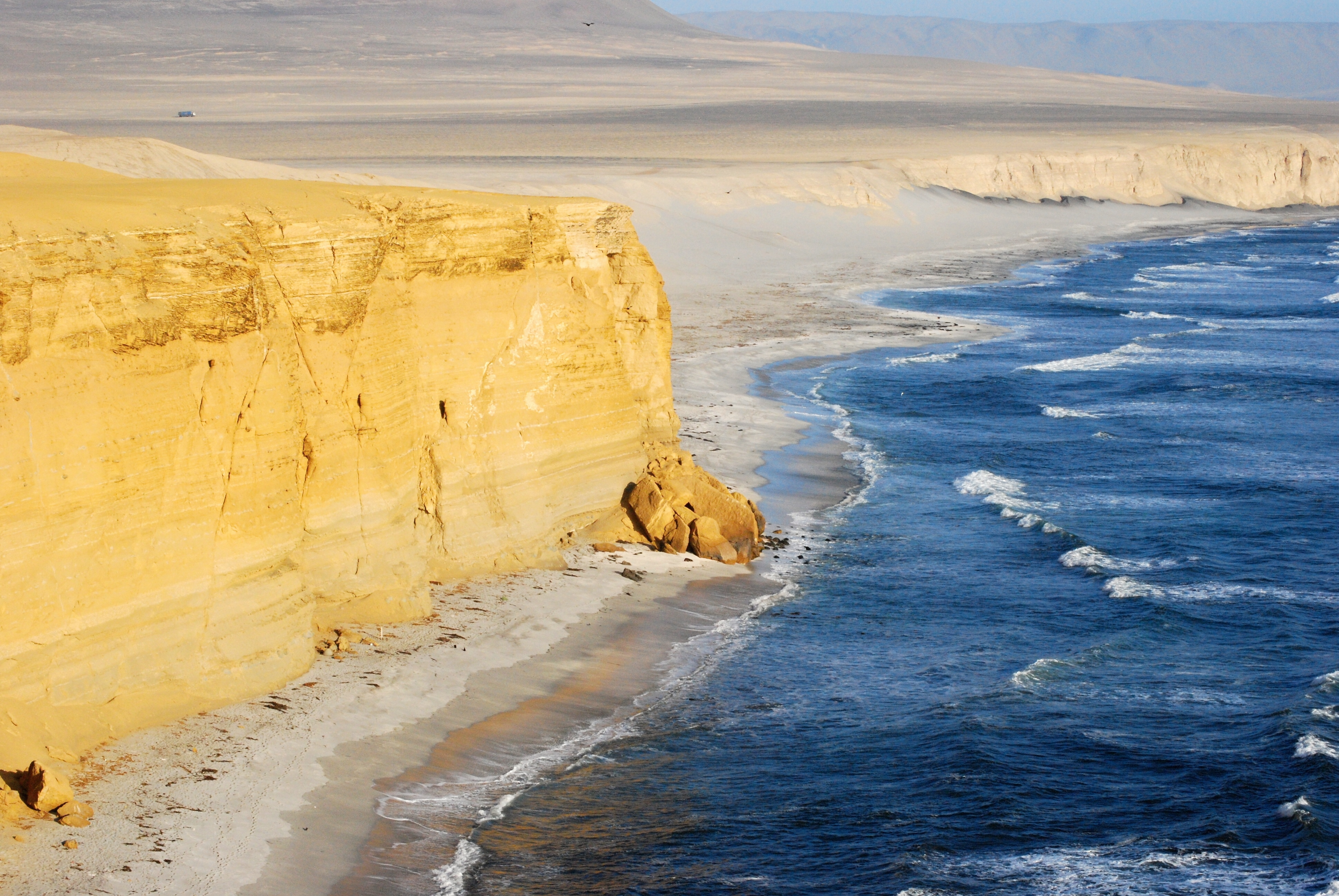 Paracas - pobřeží